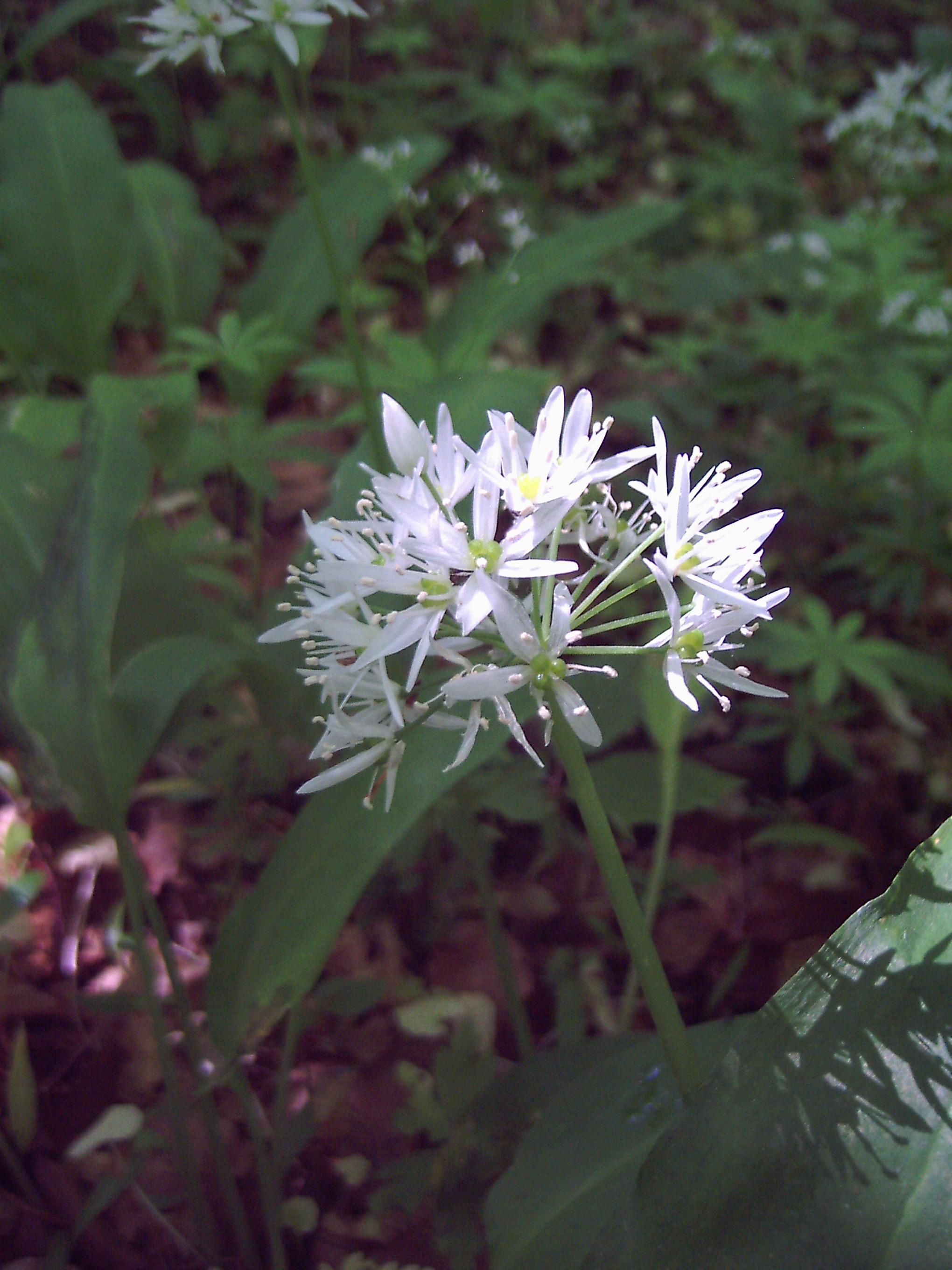 Bärlauch an einem Standort im Hainich. Das Liliengewächs bildet im Mai im Hainich große Blütenteppiche von z.T. mehr als 100 ha Größe aus.